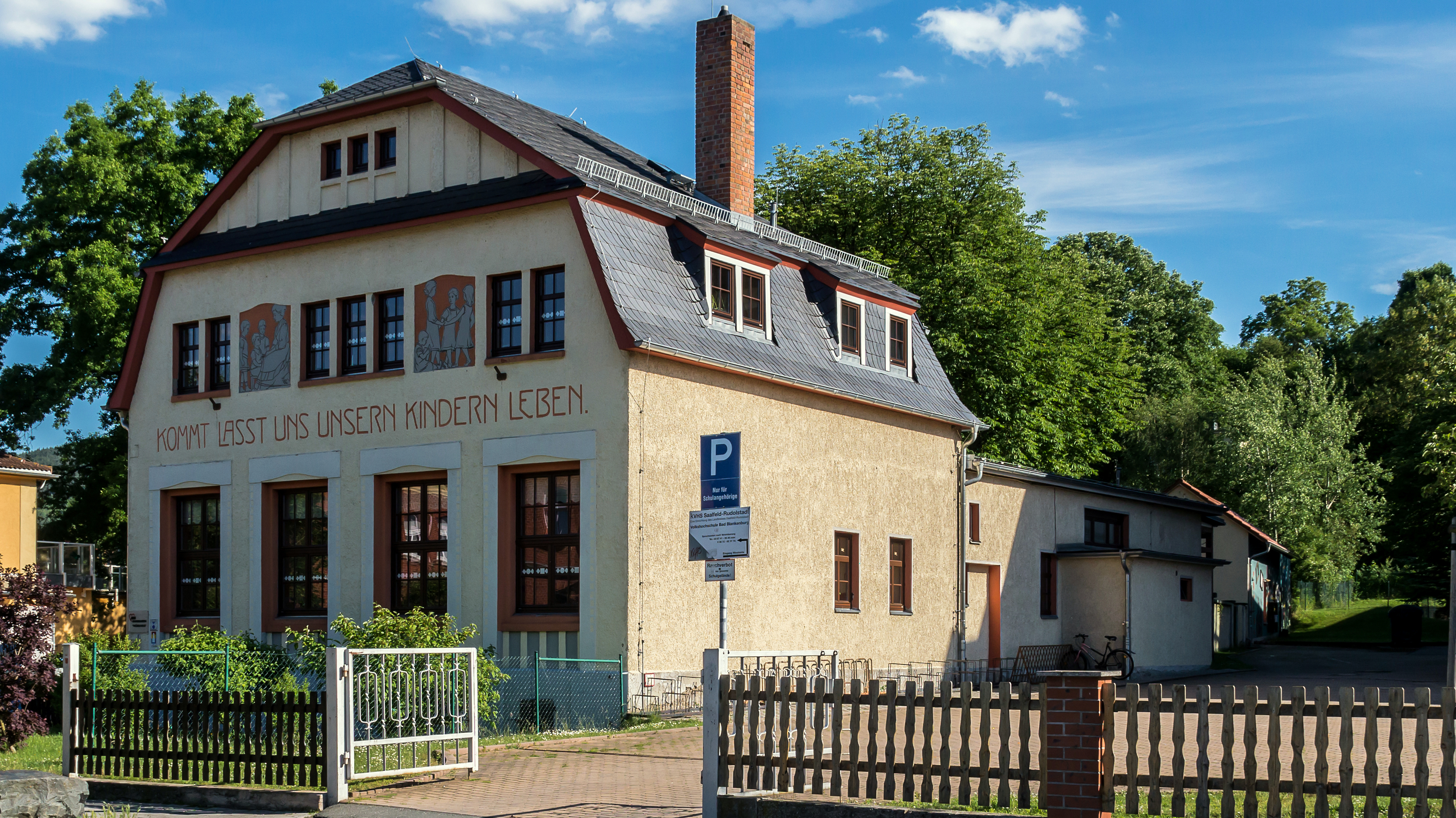 Denkmalgeschützter Kindergarten Fröbelhaus Bad Blankenburg Bähringstraße 6